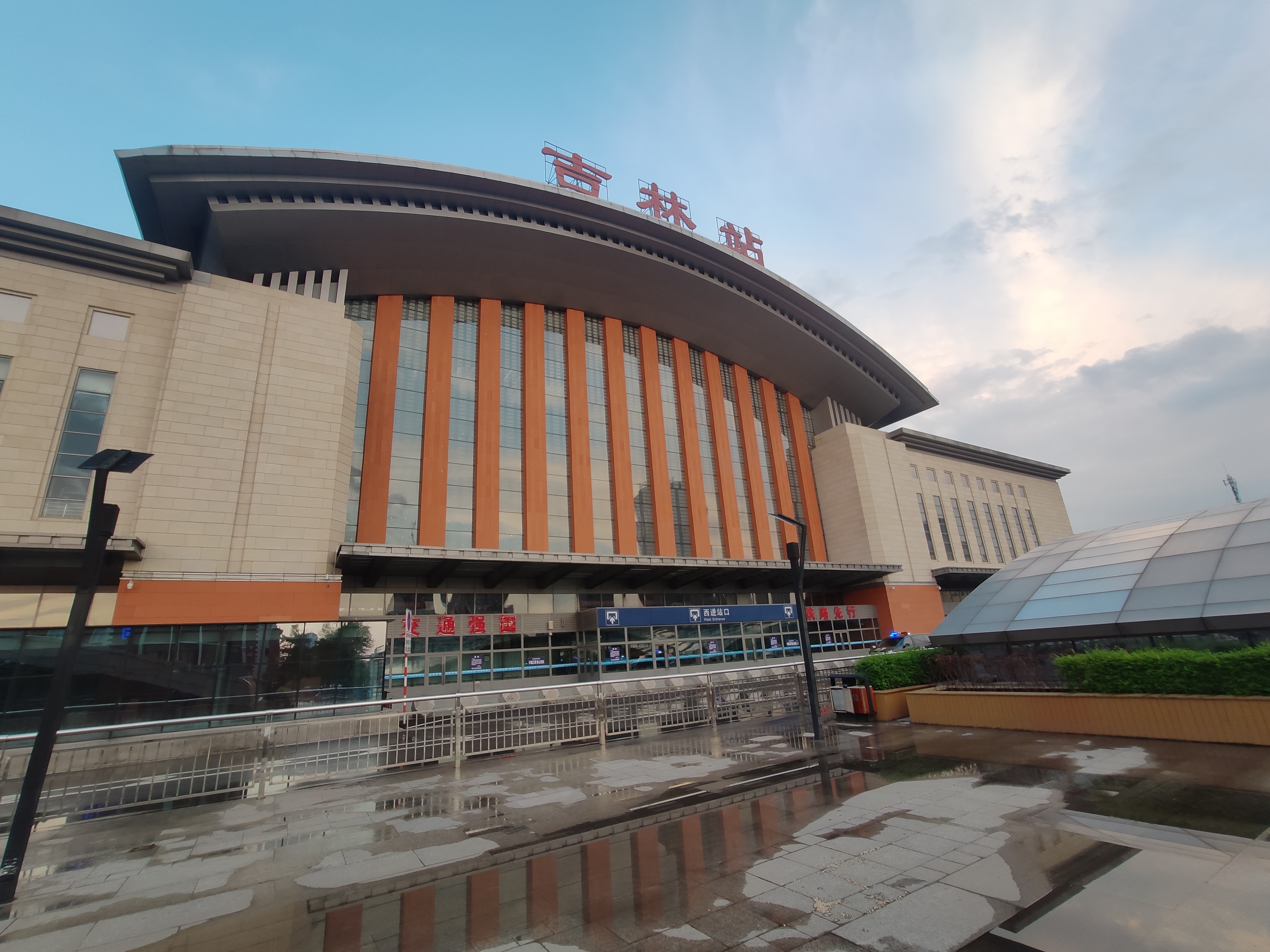 吉林站西进站口。吉林站于2020年5月13日起关闭进站通道。